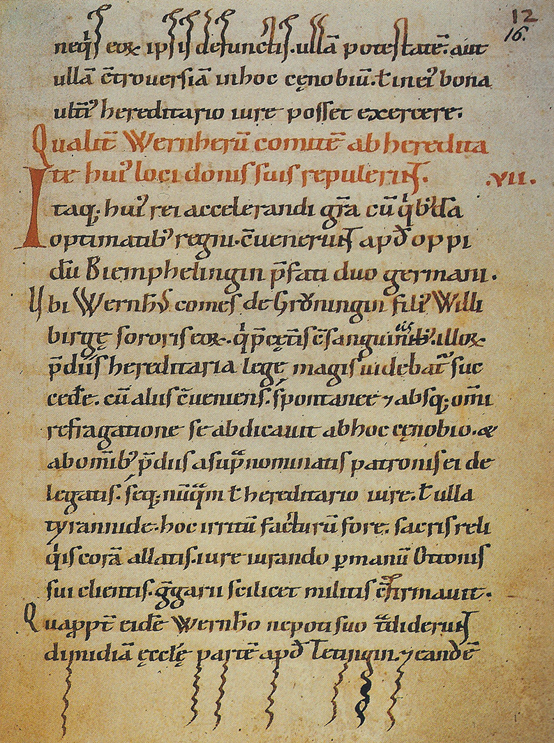 Titel des in der Ortulf-Chronik wiedergegebenen "Bempflinger Vertrags" zwischen den Grafen von Achalm und Graf Werner von Grüningen (1089/90)